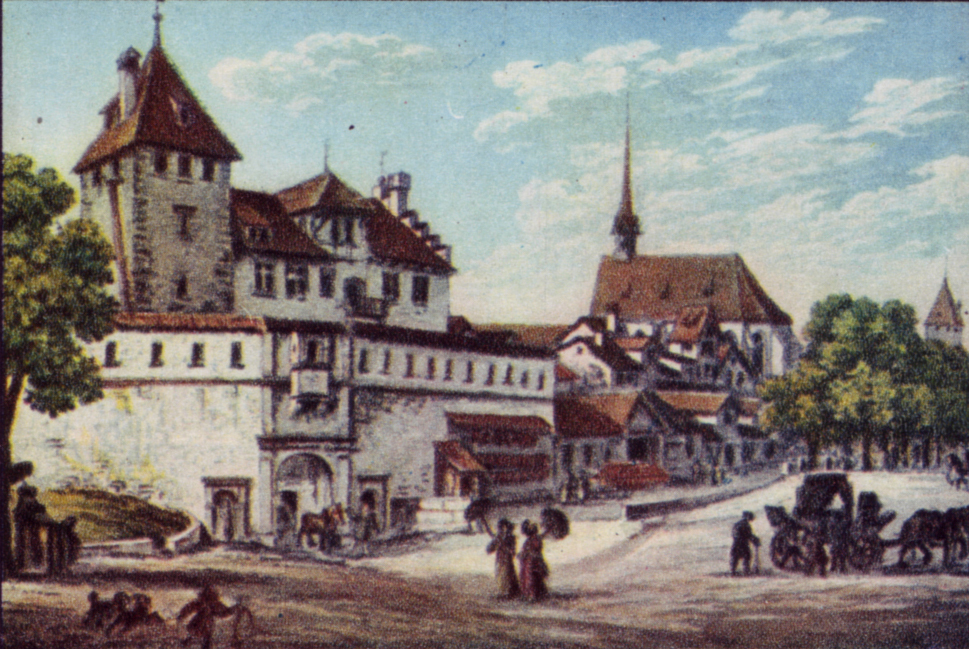 Das Kronen- oder Neumarkttor in Zürich (abgetragen 1827)